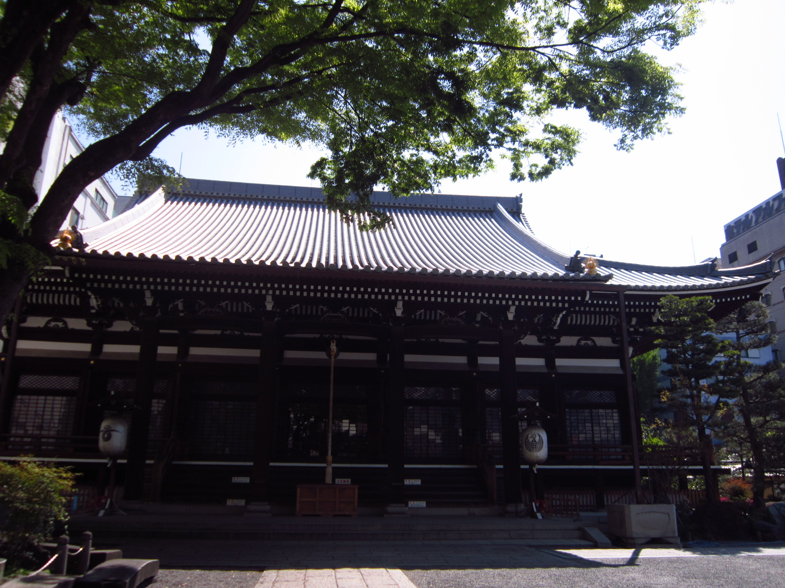 中文（台灣）: 本能寺主殿